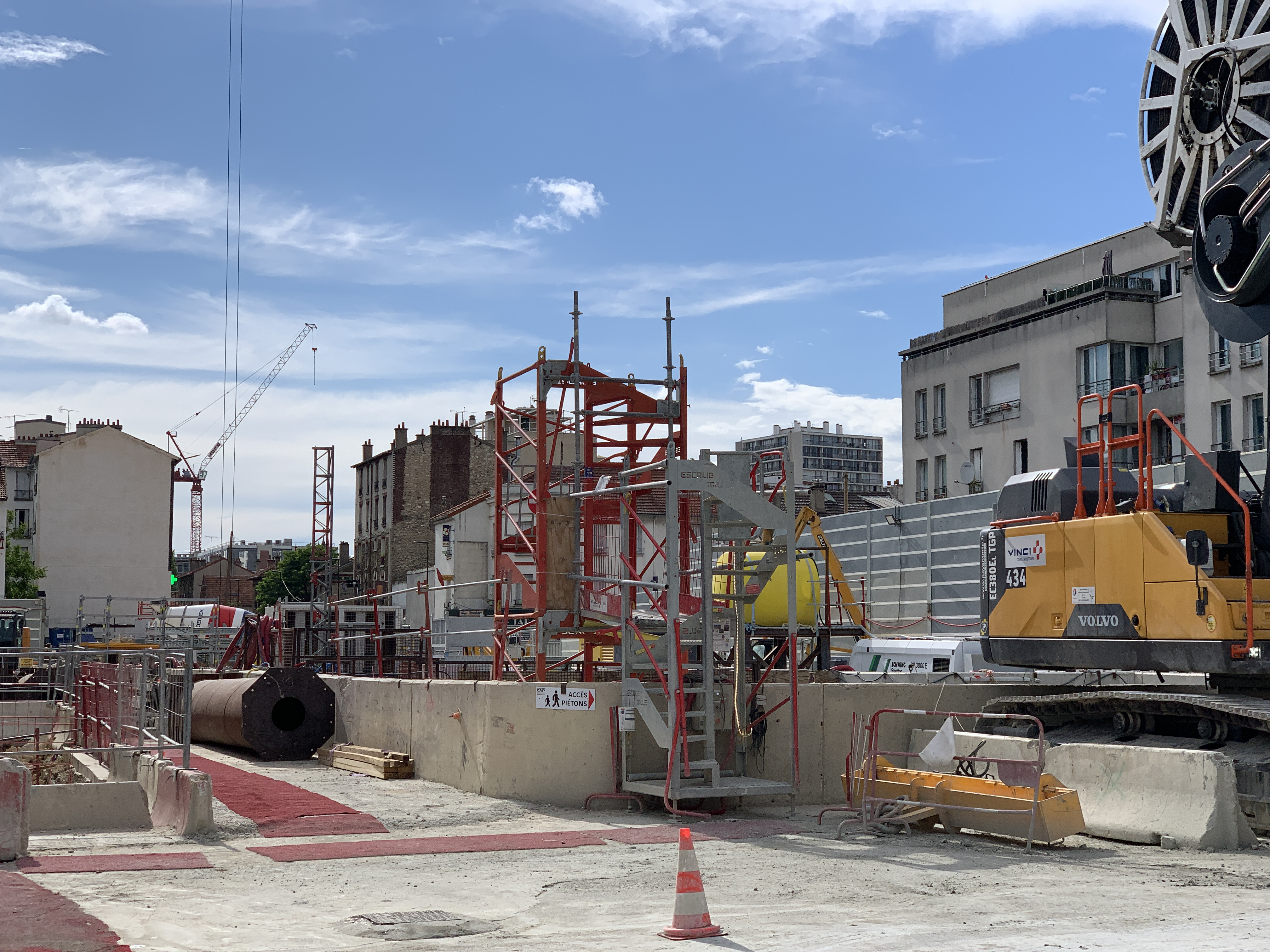 Chantier de la station de métro Villejuif - Louis Aragon, ligne 15 du métro de Paris, Villejuif.